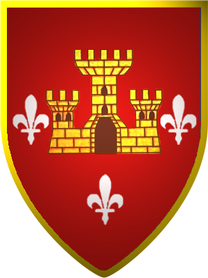 Pavlovići grb